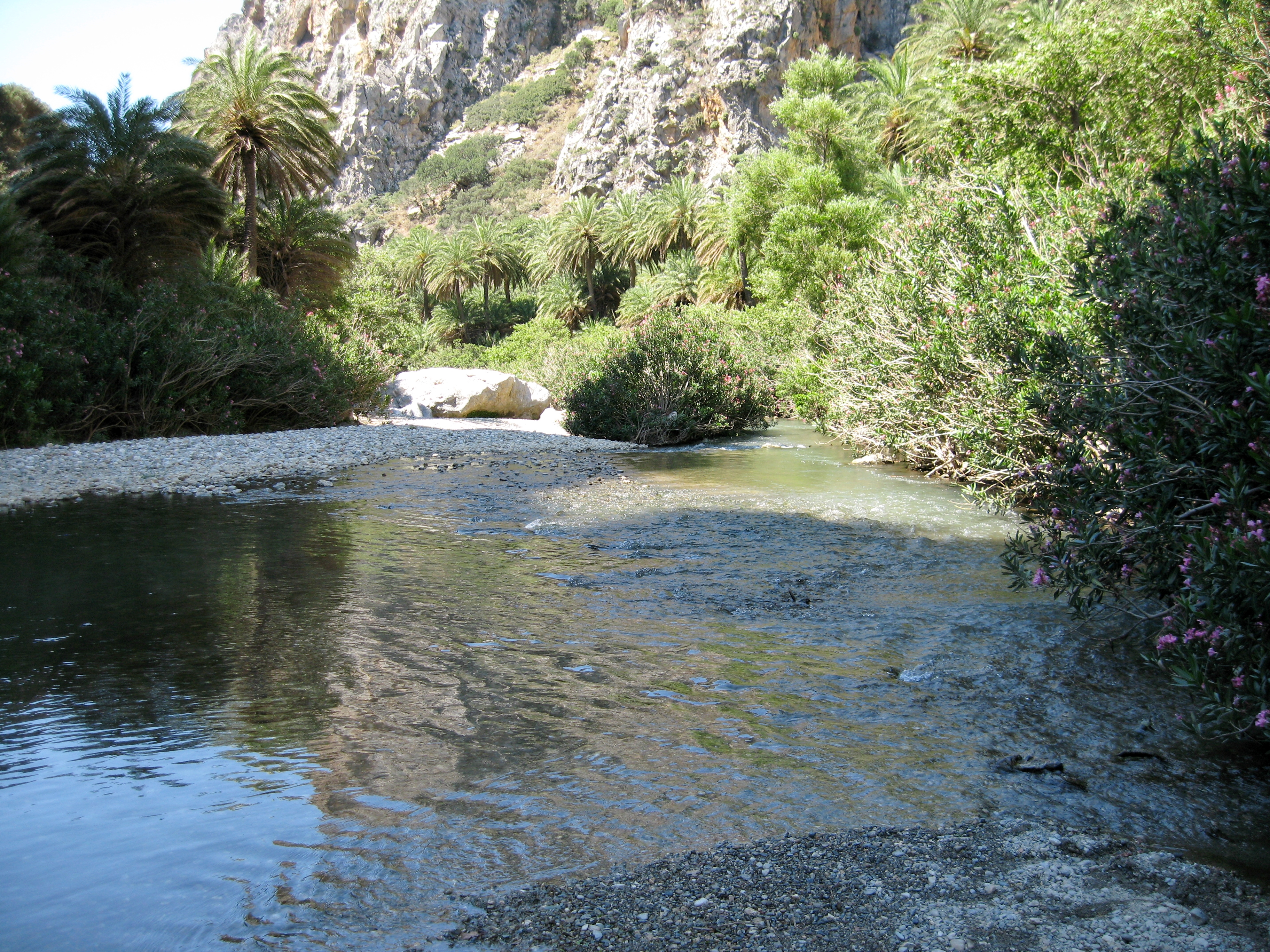 Unterlauf des Megalopotamos (Μεγαλοπόταμος), Gemeinde Agios Vasilios, Regionalbezirk Rethymno, Kreta, Griechenland